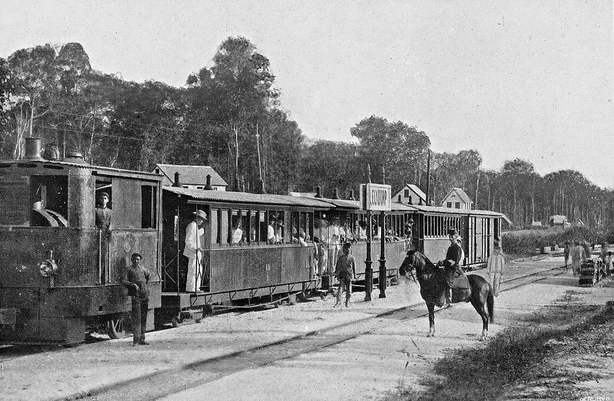 Lawabahn - Bahnhof Lelydorp